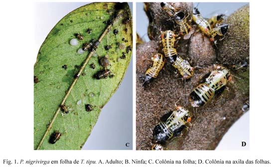 psilídeo (animal) presente na árvore tipuana tipu